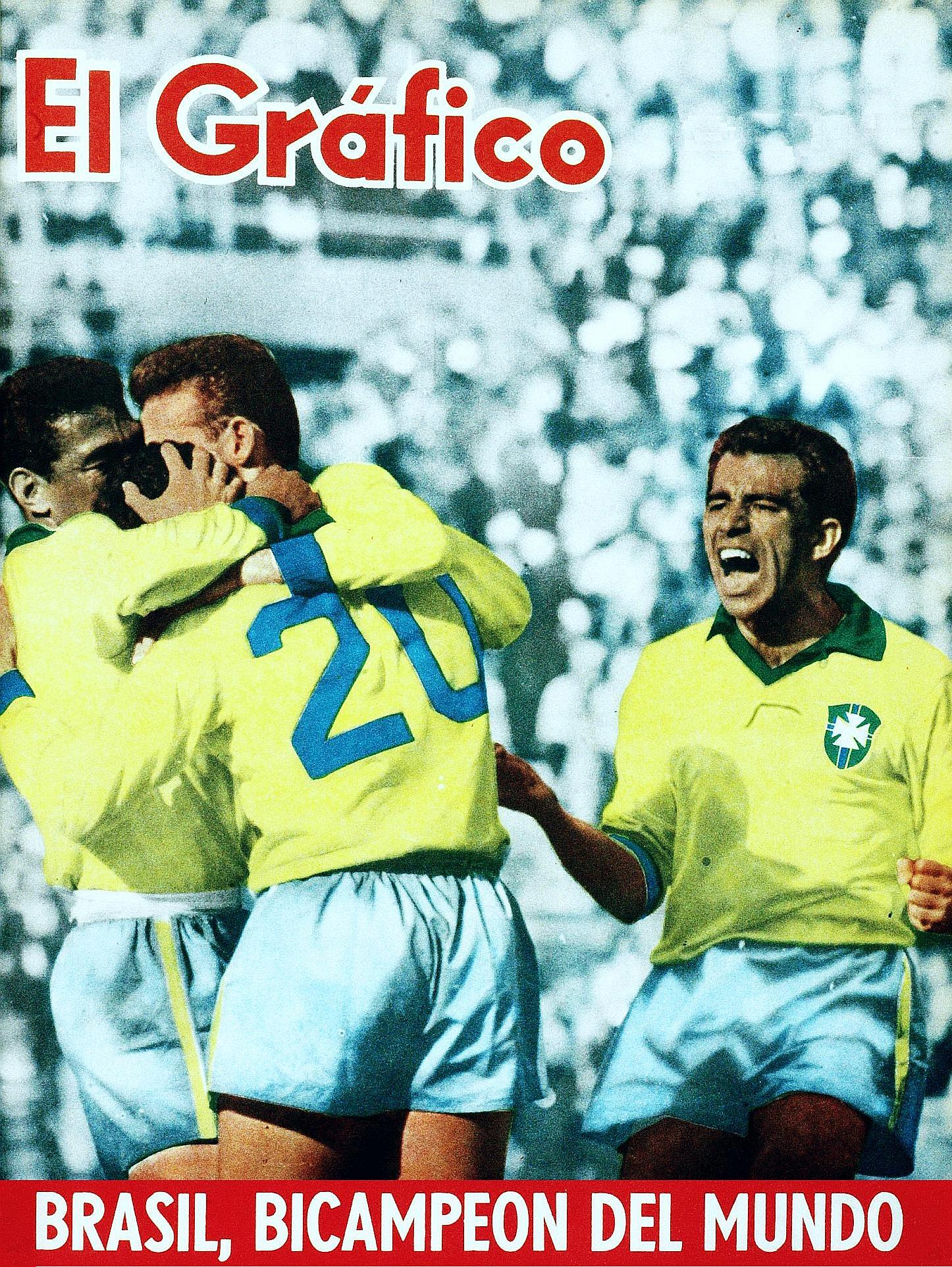 El Grafico del 11 de Julio de 1962. Edicion 2231